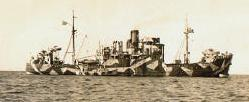 Sperrbrecher 131 der deutschen Kriegsmarine.--KuK 12:50, 2. Jul 2006 (CEST) Ergänzung: Sperrbrecher 131 wurde am 13. September 1947 aus der 2.Sperrbrecherflottille der GM/SA ausgegliedert und in Hull britischen Behörden als Reparationsleistung übergeben.